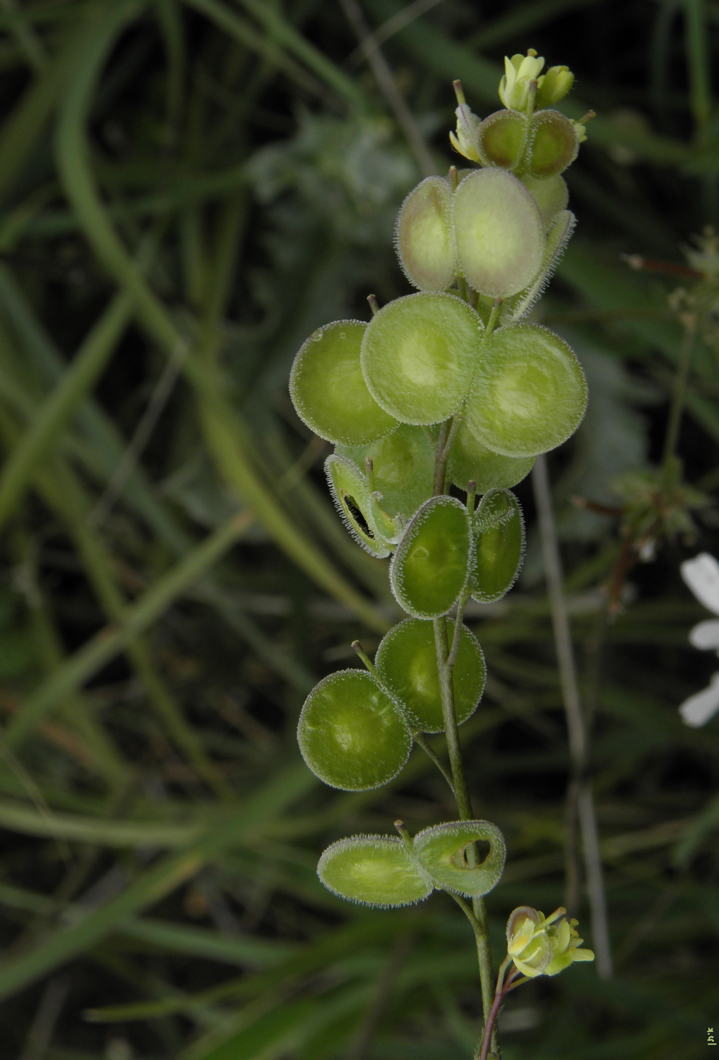 Biscutella didyma מצילתיים מצויים - ליד יקנעם